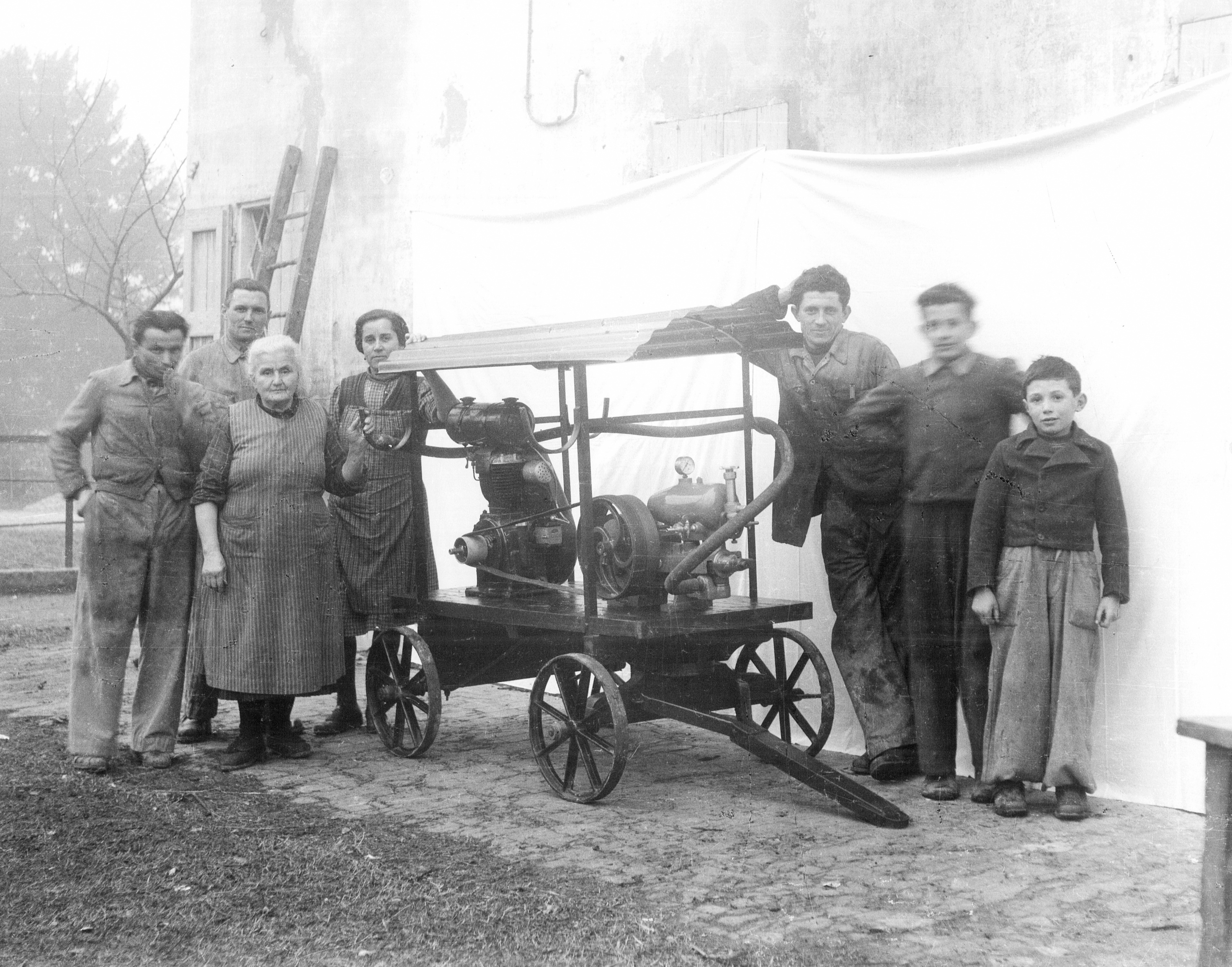 1948 - Foto famiglia Goldoni